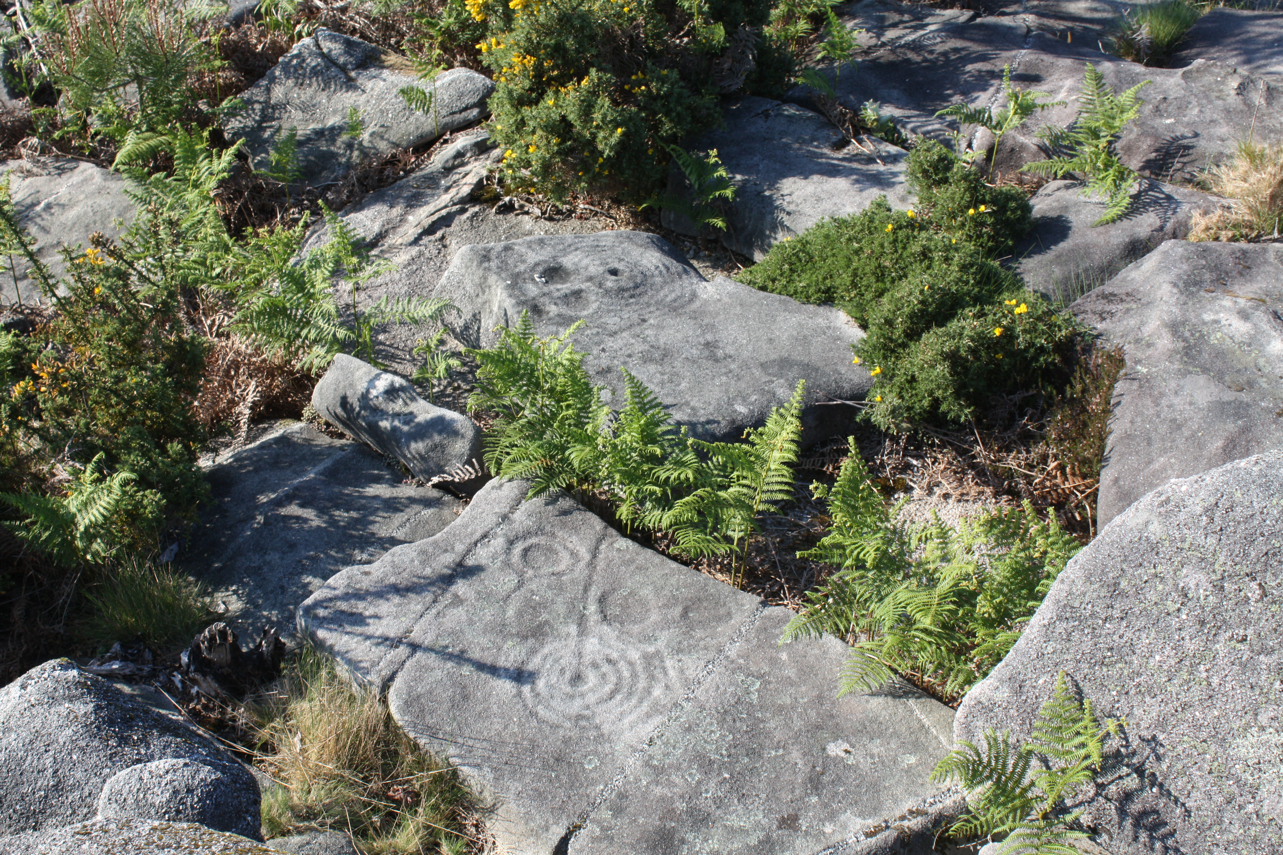 Petróglifos do Outeiro da Tartaruga (Samiera, Poio, Pontevedra)